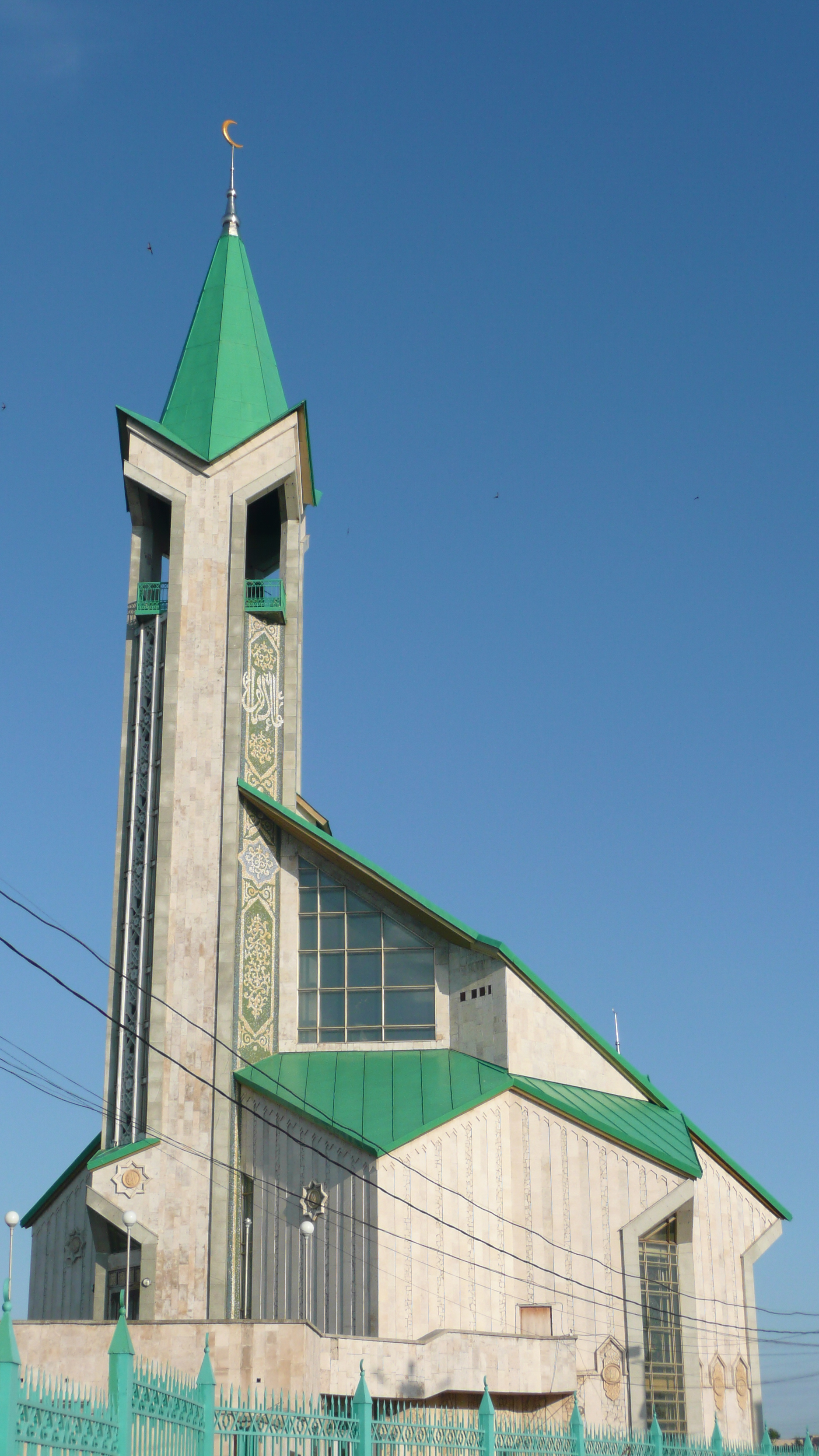 Mosque in Naberezhnye Chelny